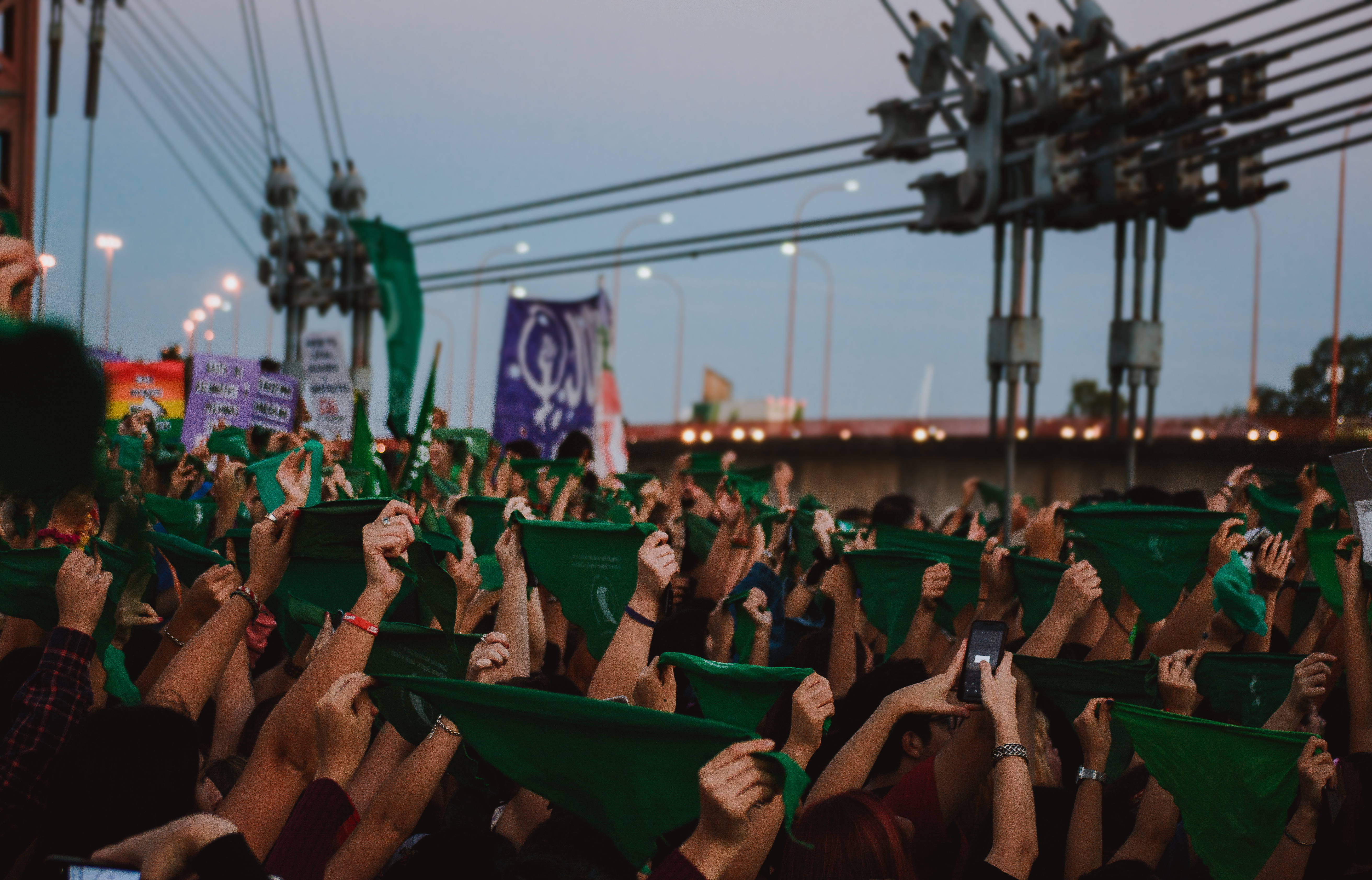 Pañuelazo por el derecho al aborto legal, seguro y gratuito - Santa Fe - Santa Fe Fotografía: Agustina Girardo